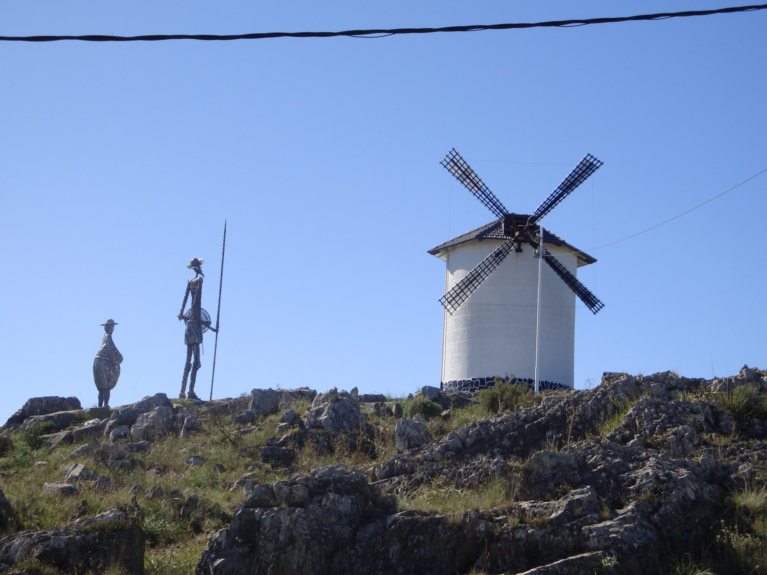 Monumento a Don Quijote de la Mancha, recreando el Molino de Viento y Sancho Panza